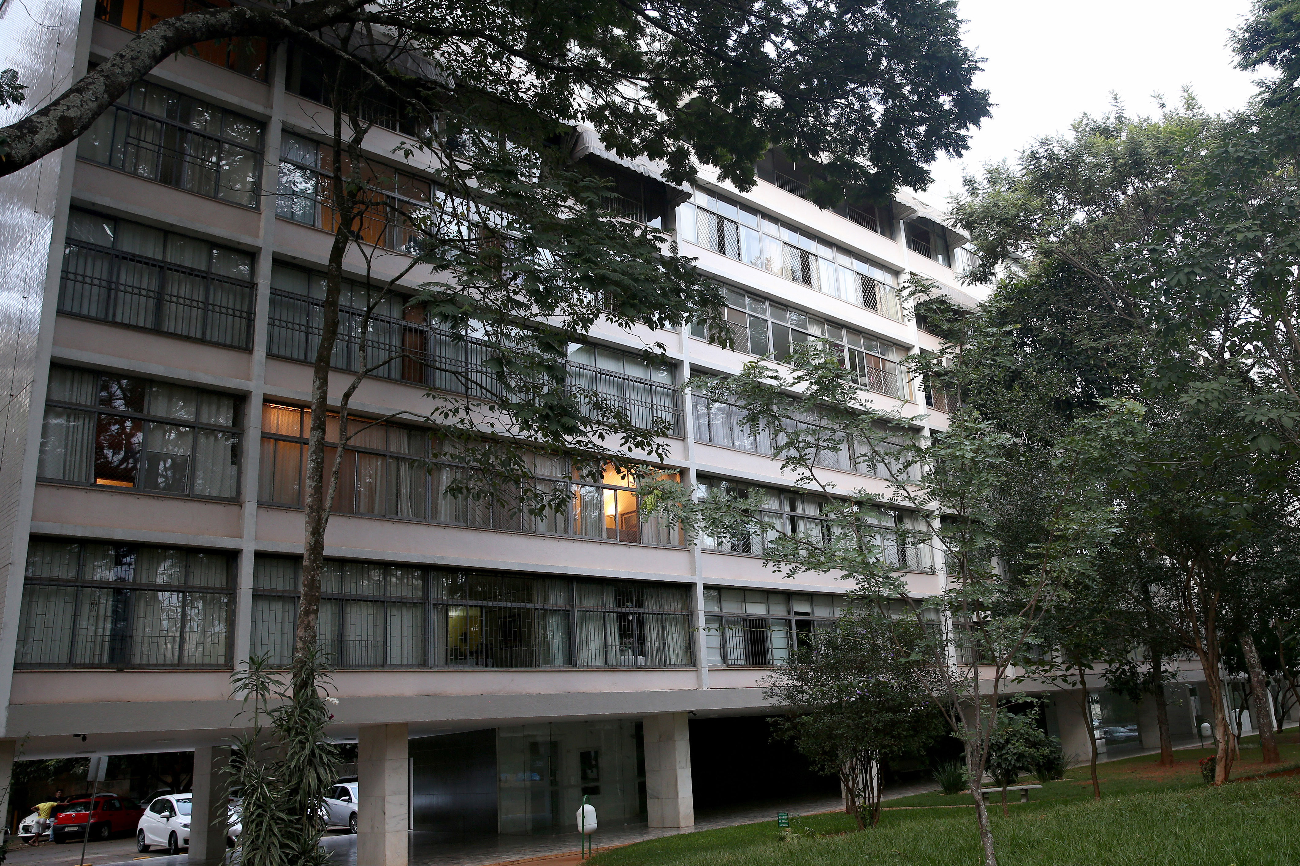 Brasília - Superquadra 305, na Asa Sul (Wilson Dias/Agência Brasil)